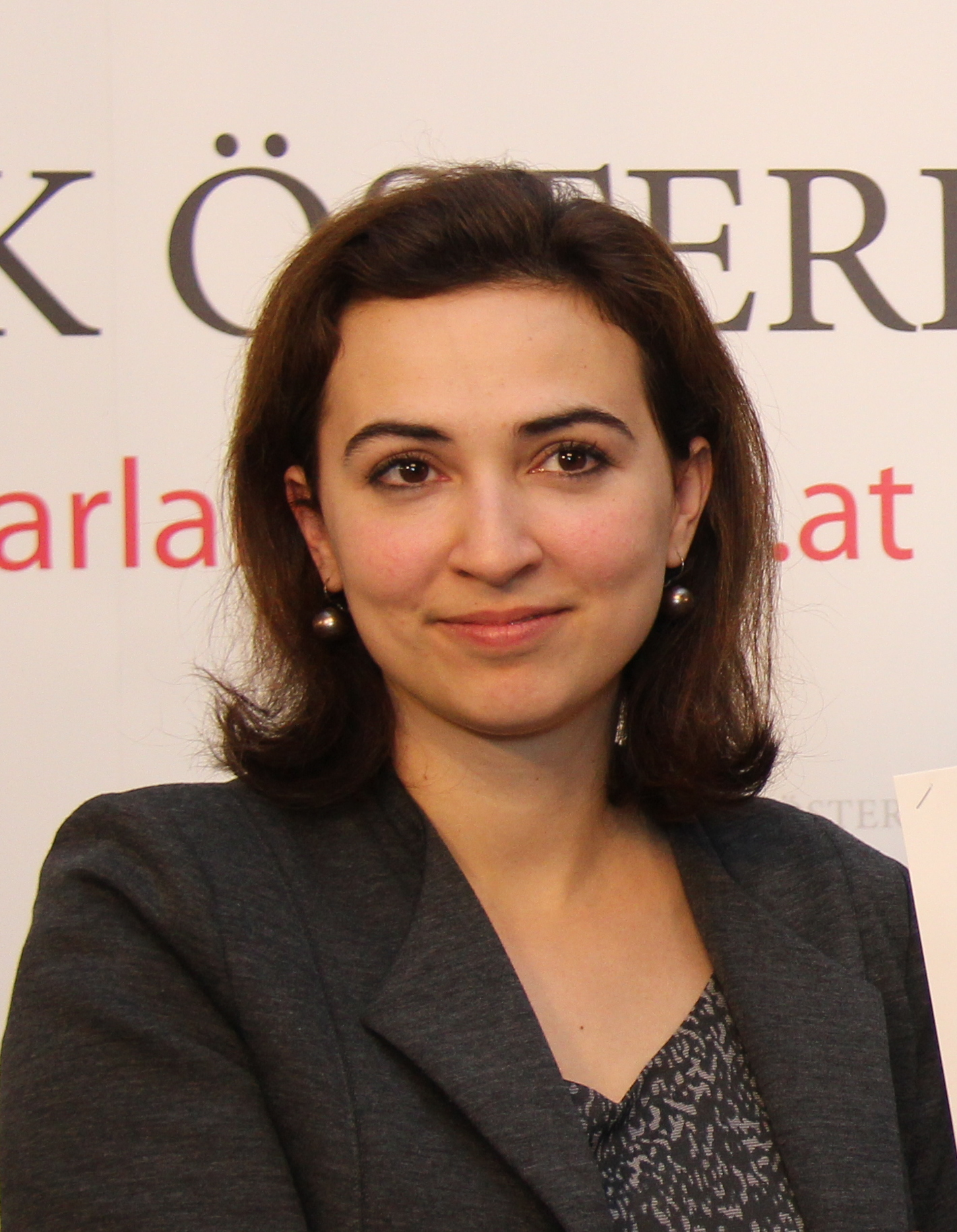 Präsentation Antrag U-Ausschuss Krainer mit NEOS und Liste Pilz